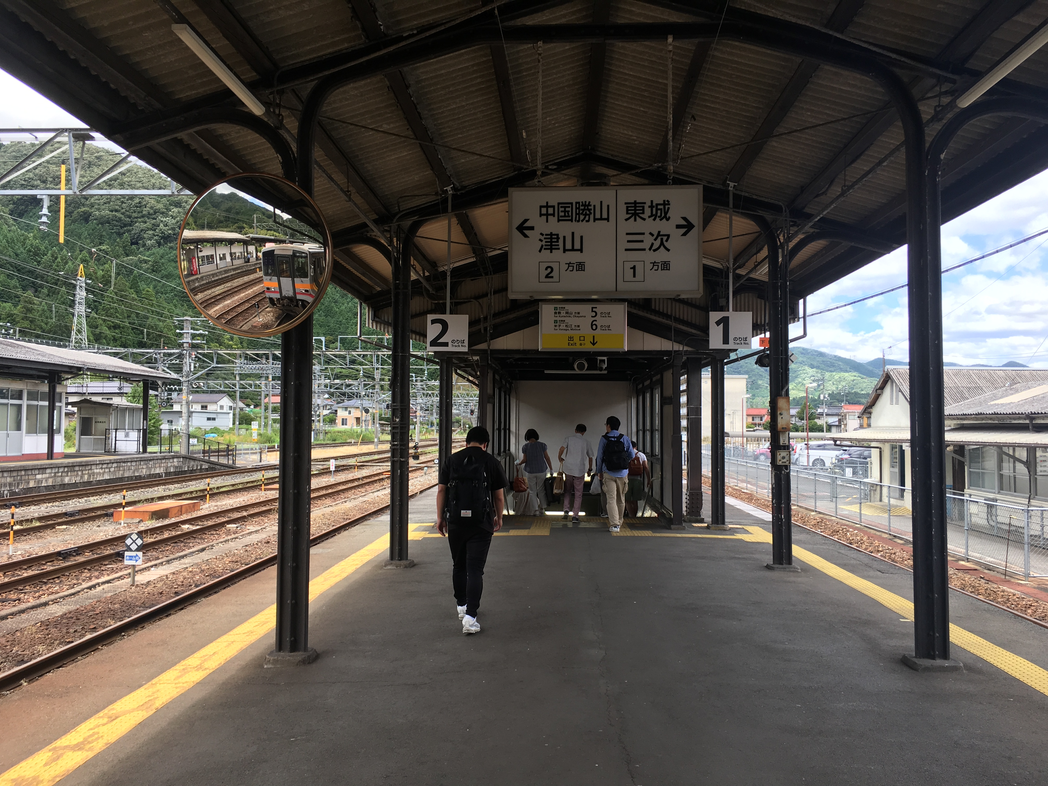 Niimi Station (新見駅)